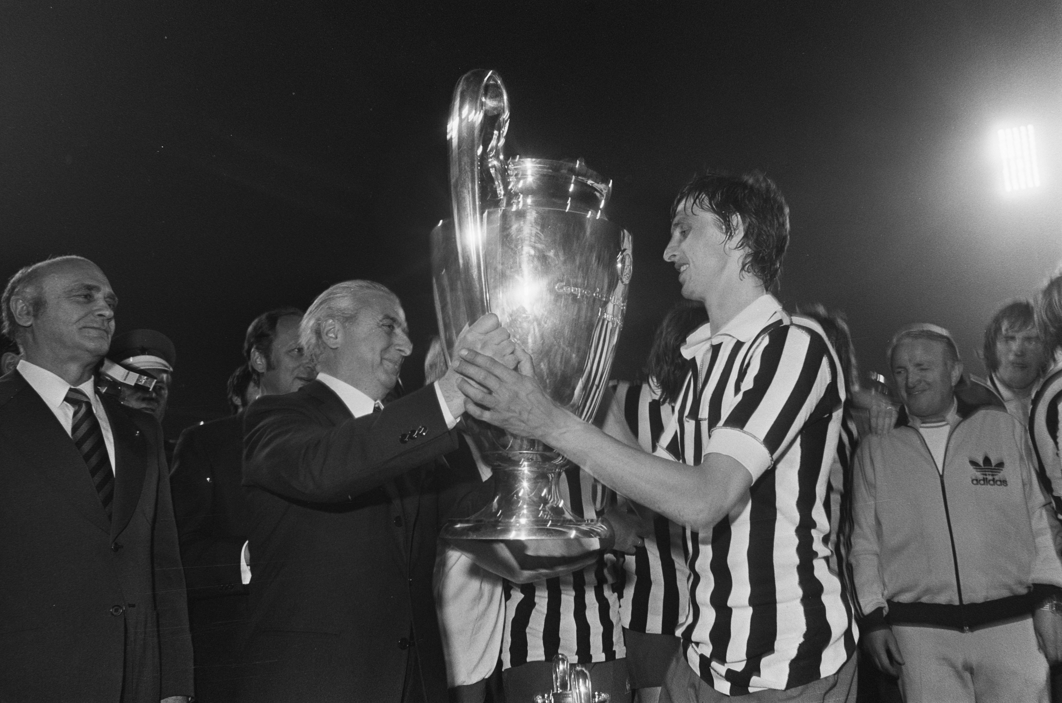 Il capitano dell'AFC Ajax, Johan Cruijff, alza la terza Coppa dei Campioni consecutiva vinta dai Lancieri; il giocatore riceve il trofeo con indosso la maglia dei finalisti della Juventus FC.